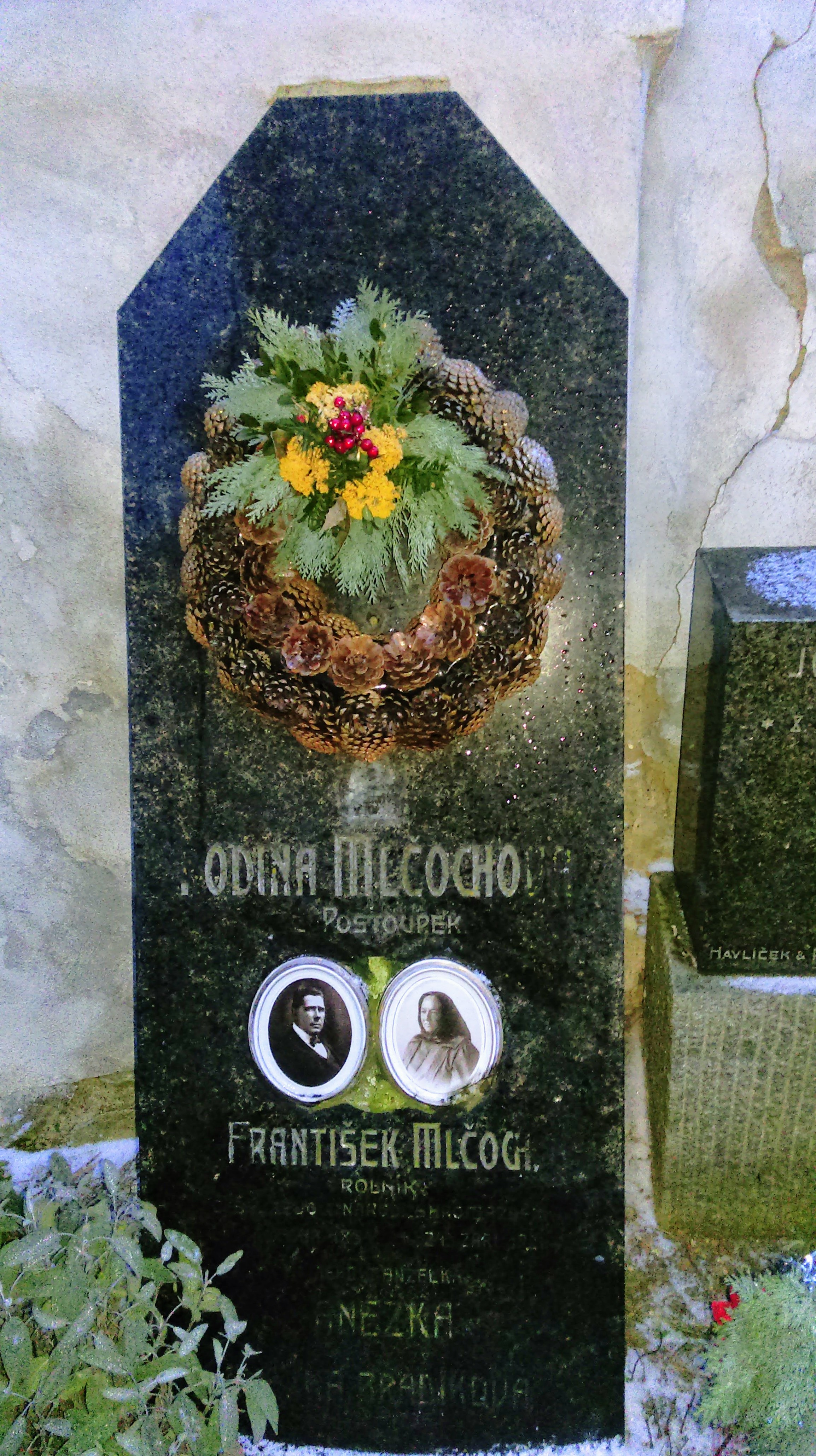 Hrob Františka Mlčocha (1855-1921) na hřbitově v Hradisku